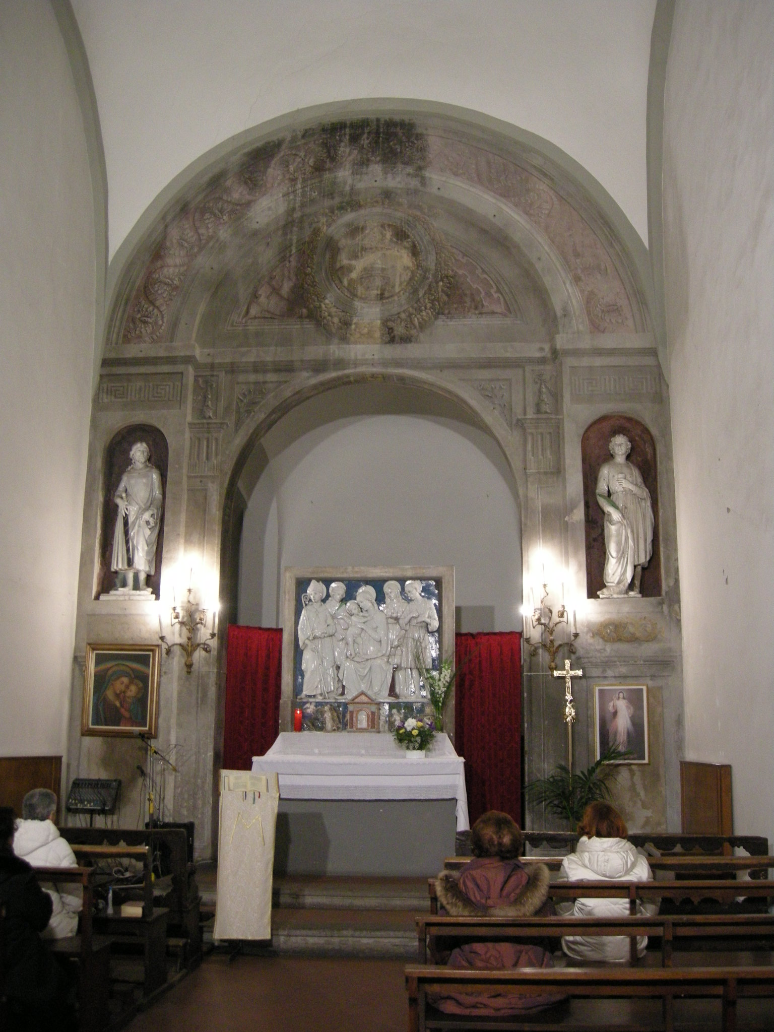 Oratorio della Madonna del Buon Consiglio, interno